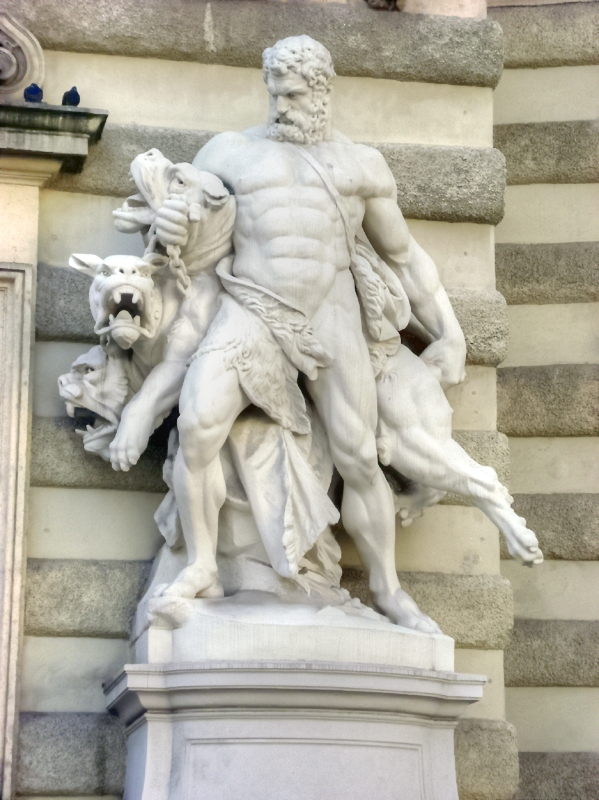 Der Michaelertrakt (Teil der Hofburg) in Wien.